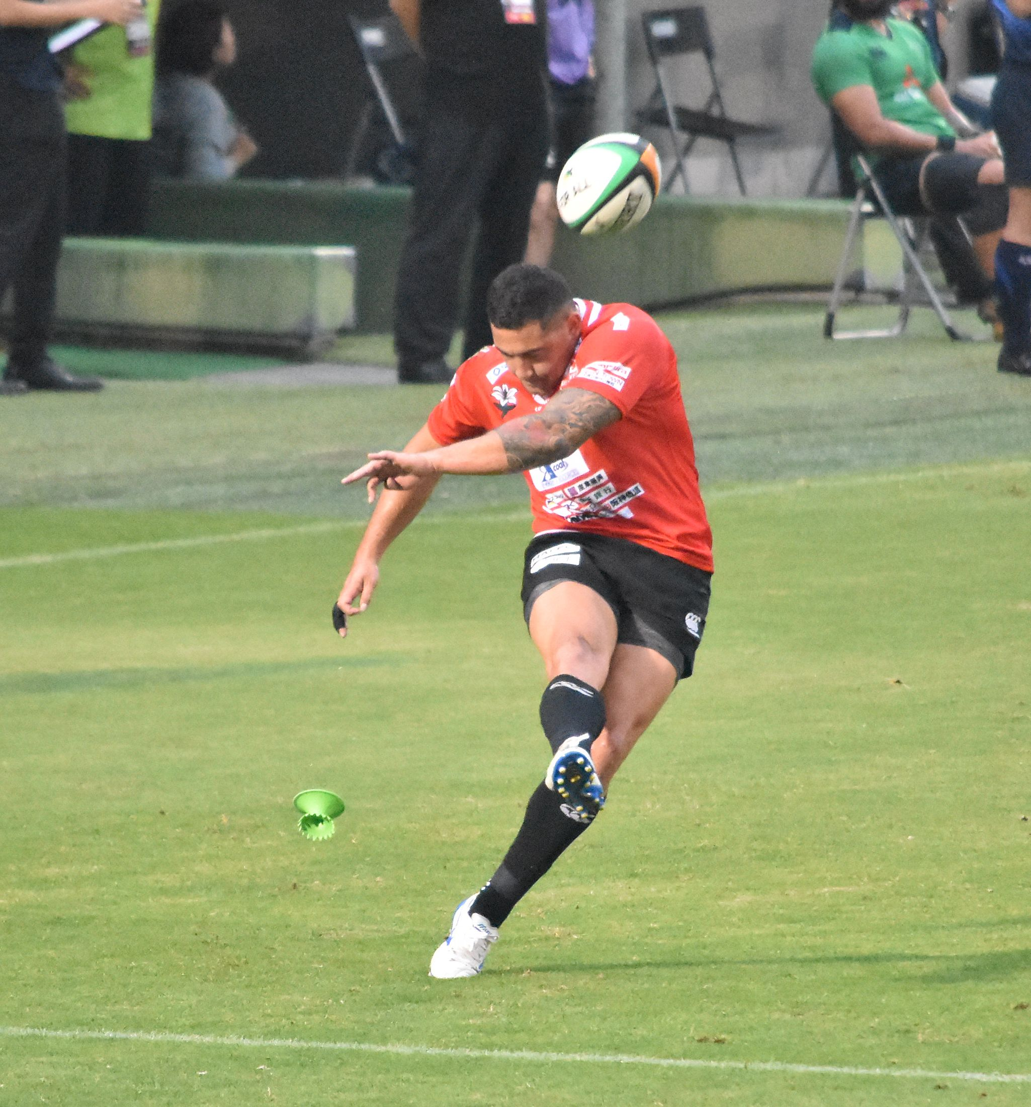 コディ・レイ